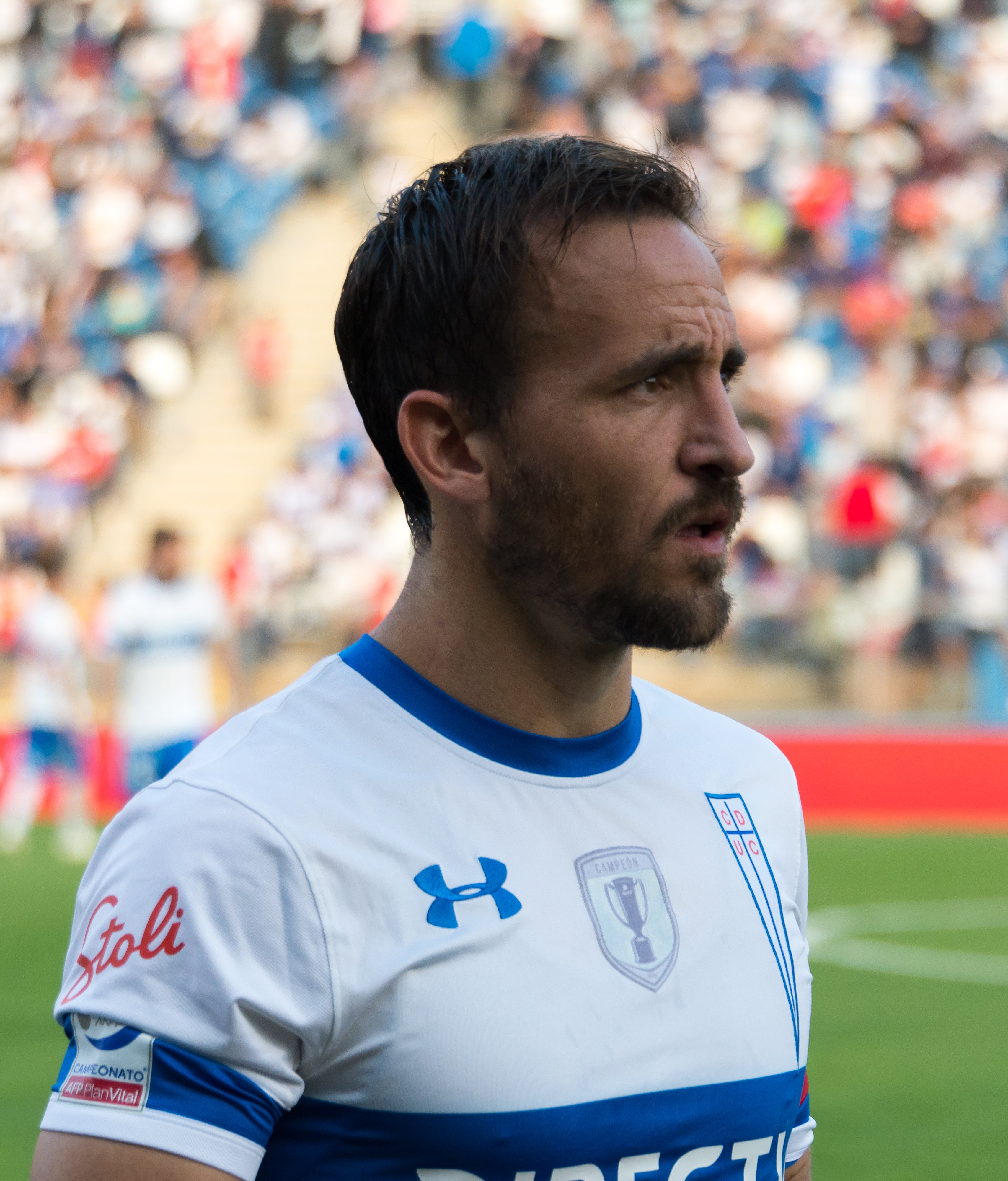 José Pedro Fuenzalida, Universidad Católica v Curicó Unido, Estadio San Carlos de Apoquindo, Las Condes, Santiago, Región Metropolitana, Chile.